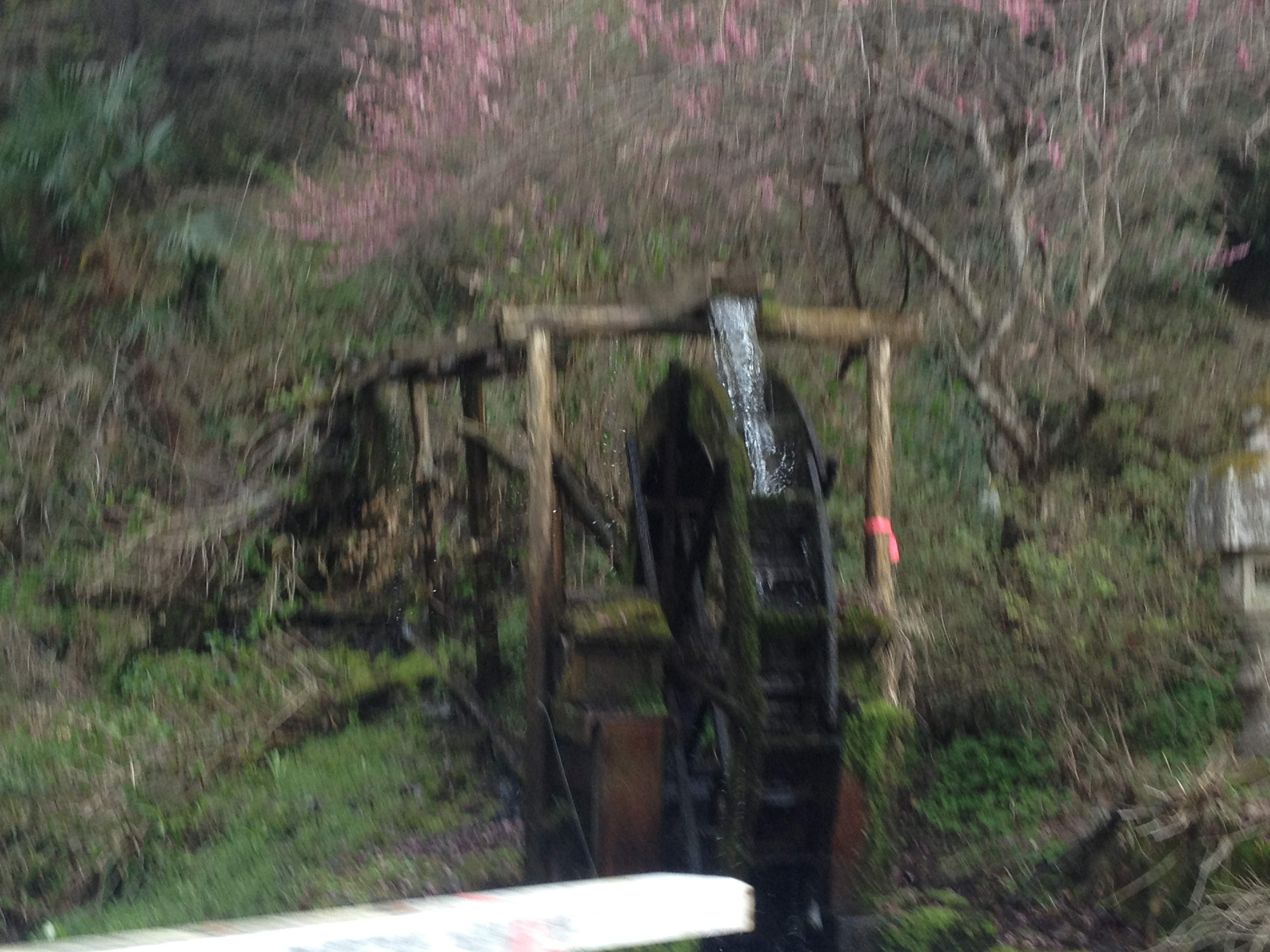 寸庭地区の水車